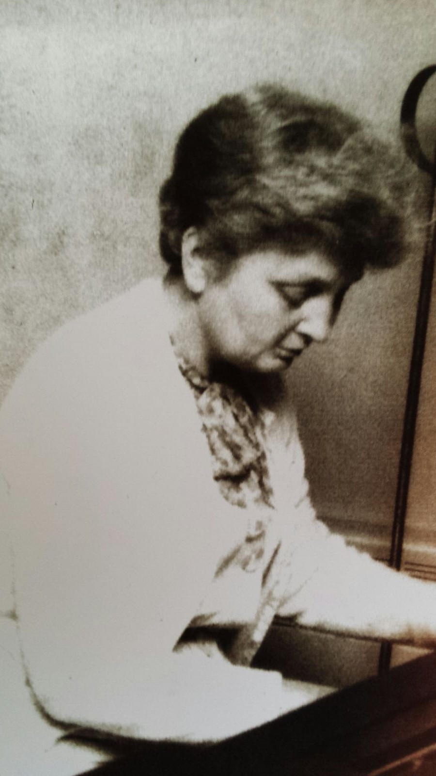 רבקה גוילי ליד הפסנתר